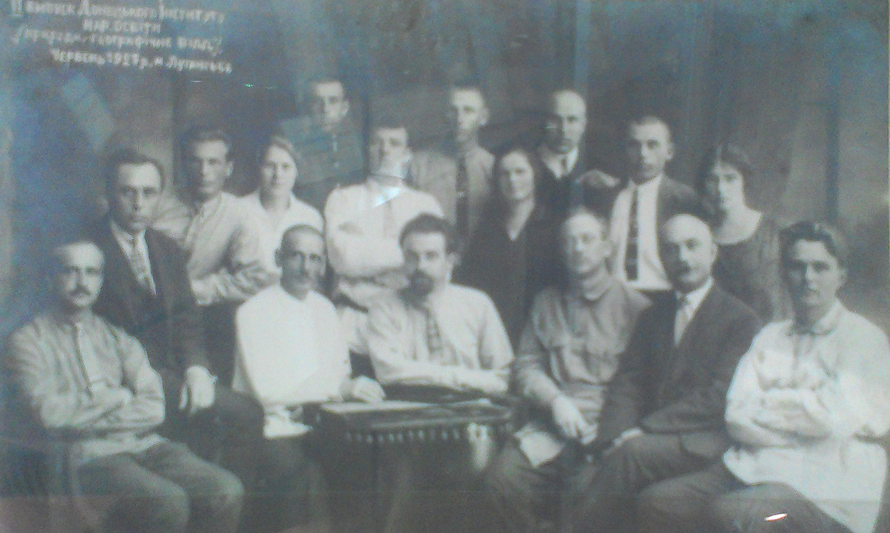 Викладачі й студенти Донецького інституту народної освіти (Луганськ)